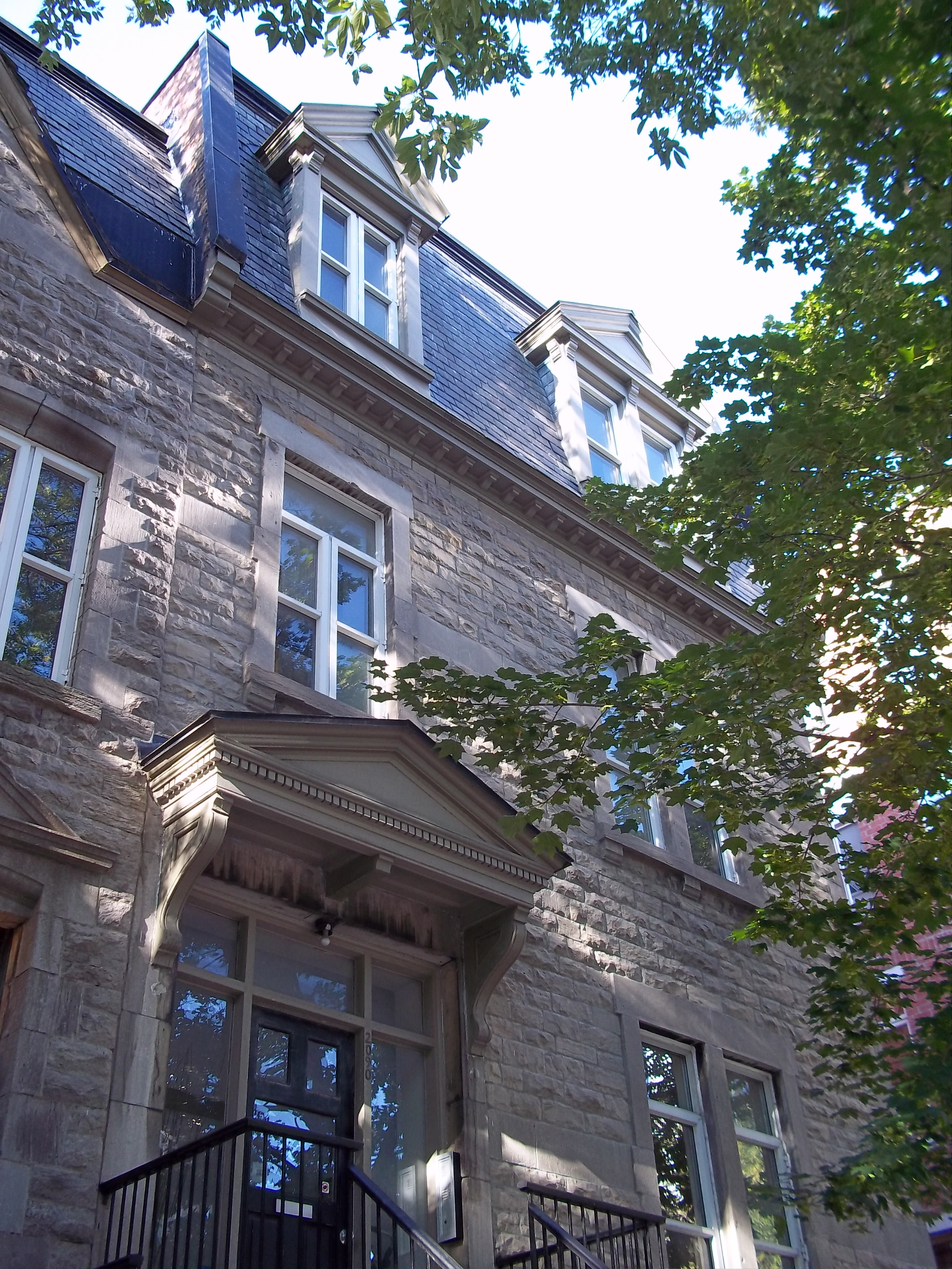 Maison Daniel-Kneen, 2090-2092, rue Jeanne-Mance, Montréal